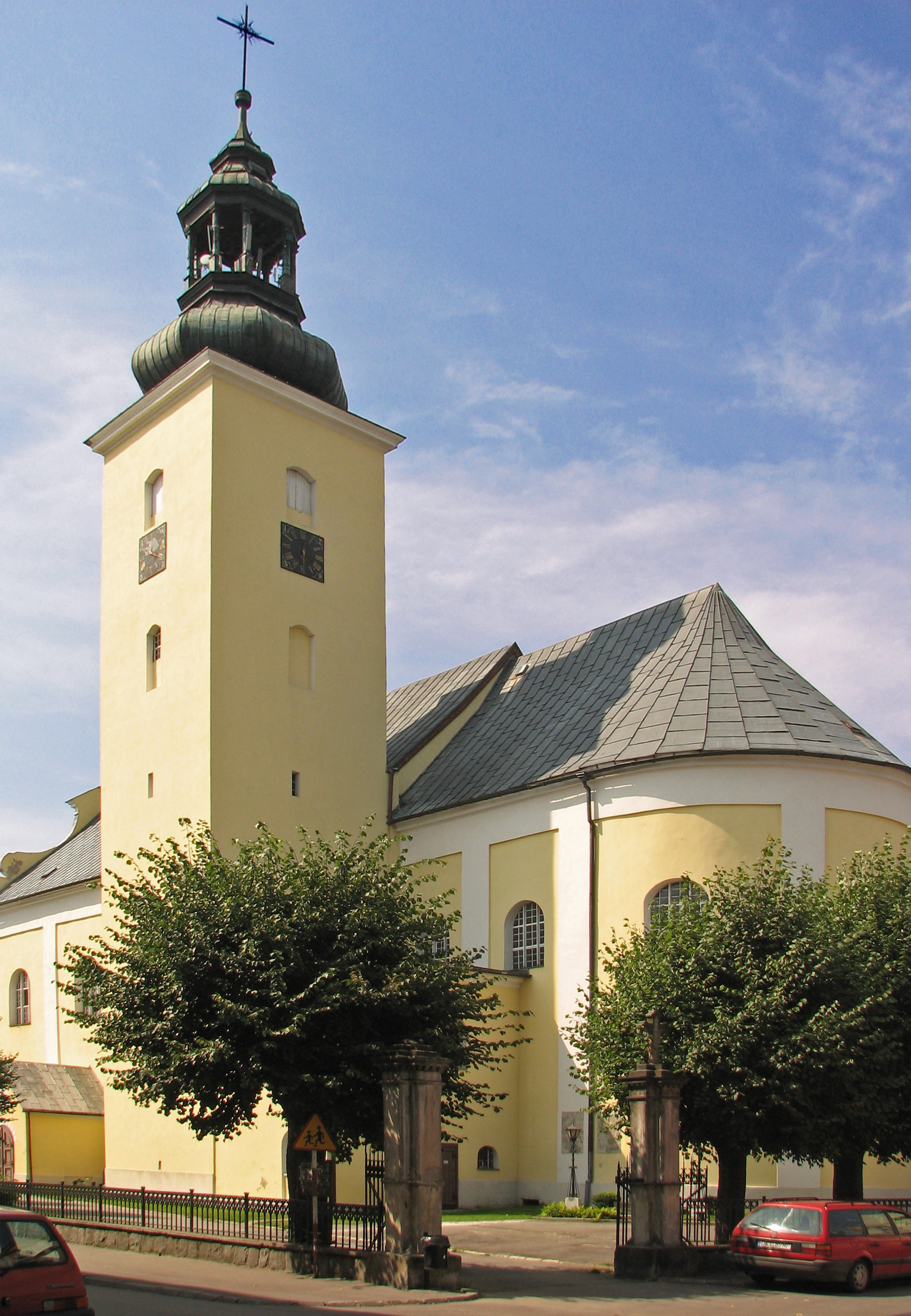 Pfarrkirche Mariä Geburt (Kościół Narodzenia NMP), westlich vom Ring, Bad Landeck (Lądek-Zdrój), Niederschlesien, Polen.